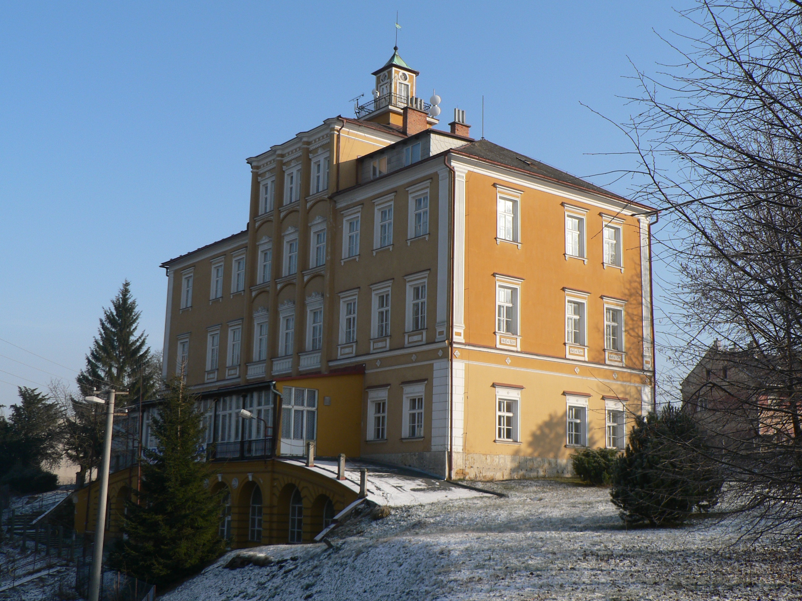 Zámek v Třemešku.